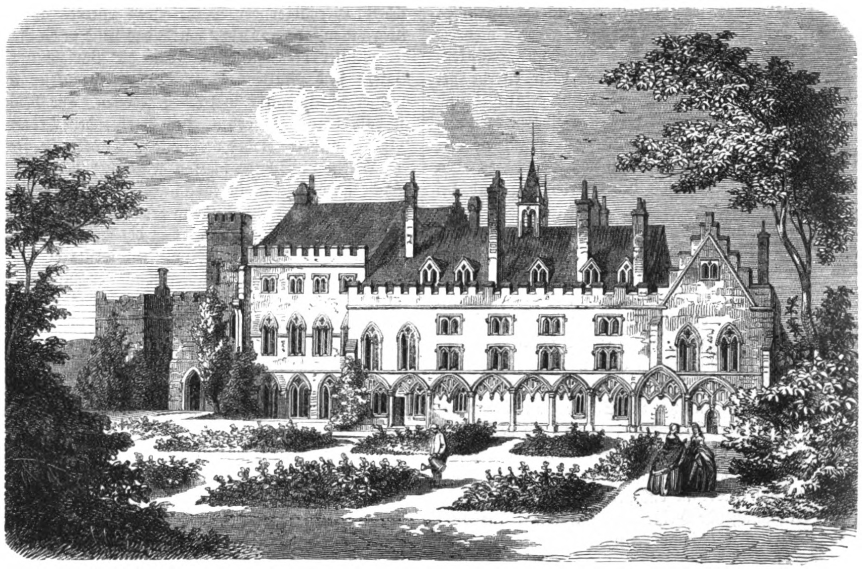 Ansicht von Battle Abbey, England.